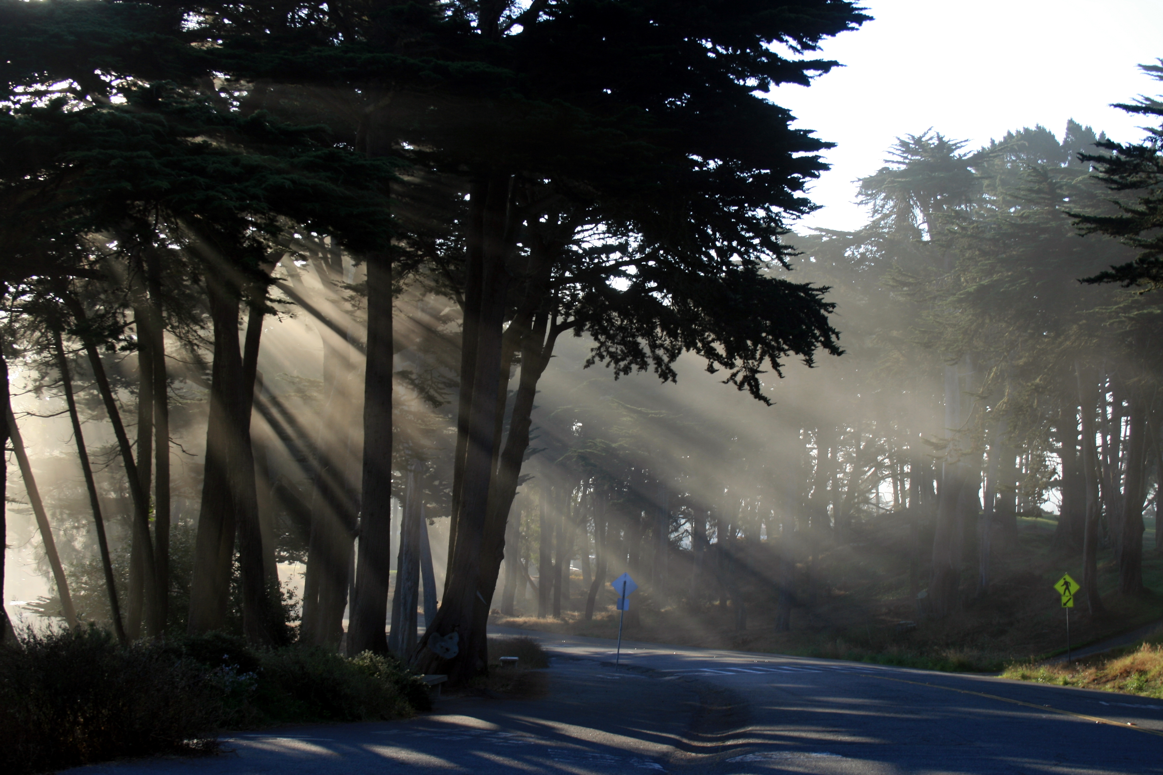 Crepuscular Rays